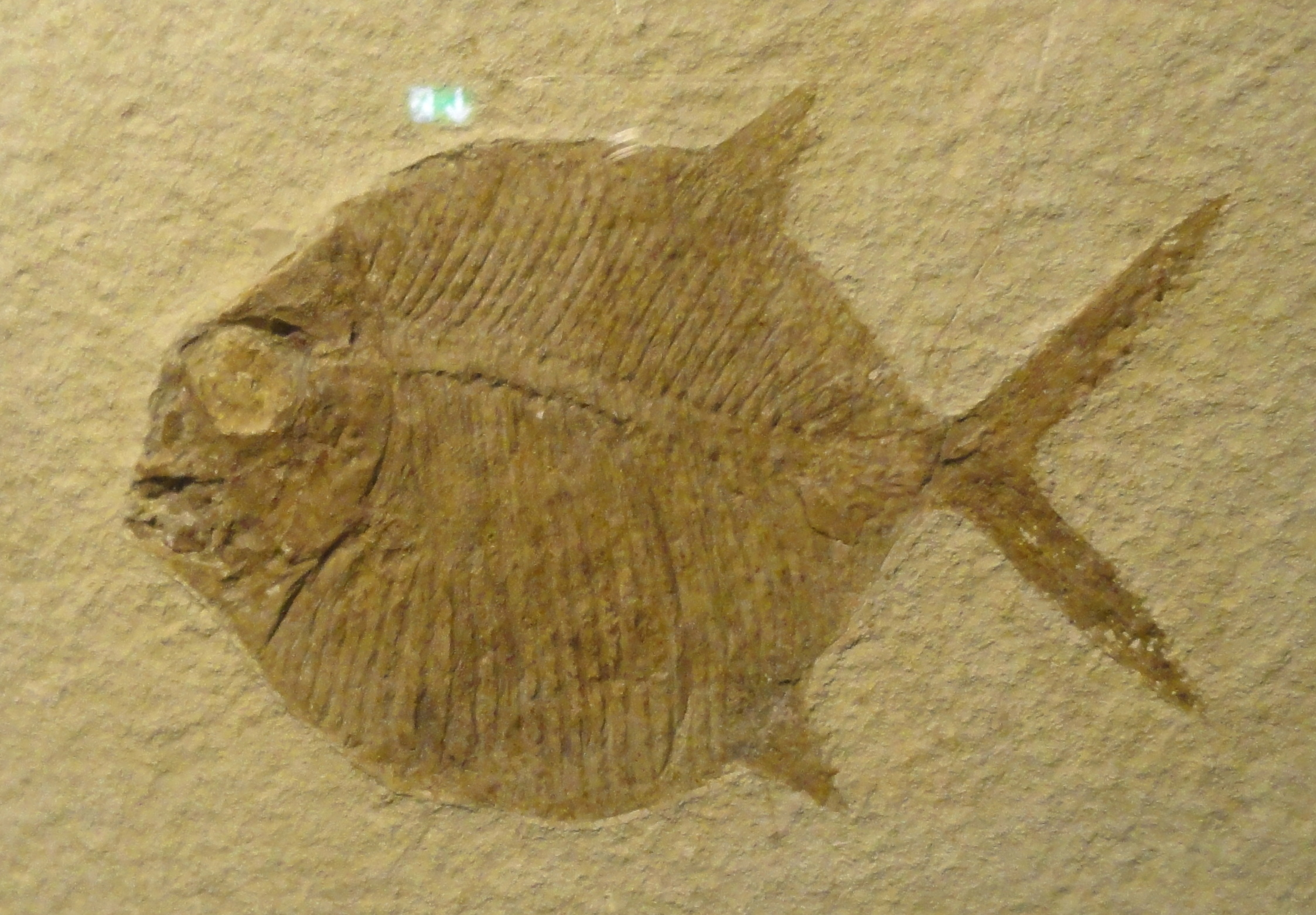 Exhibit in Naturmuseum Senckenberg, Frankfurt am Main, Germany.